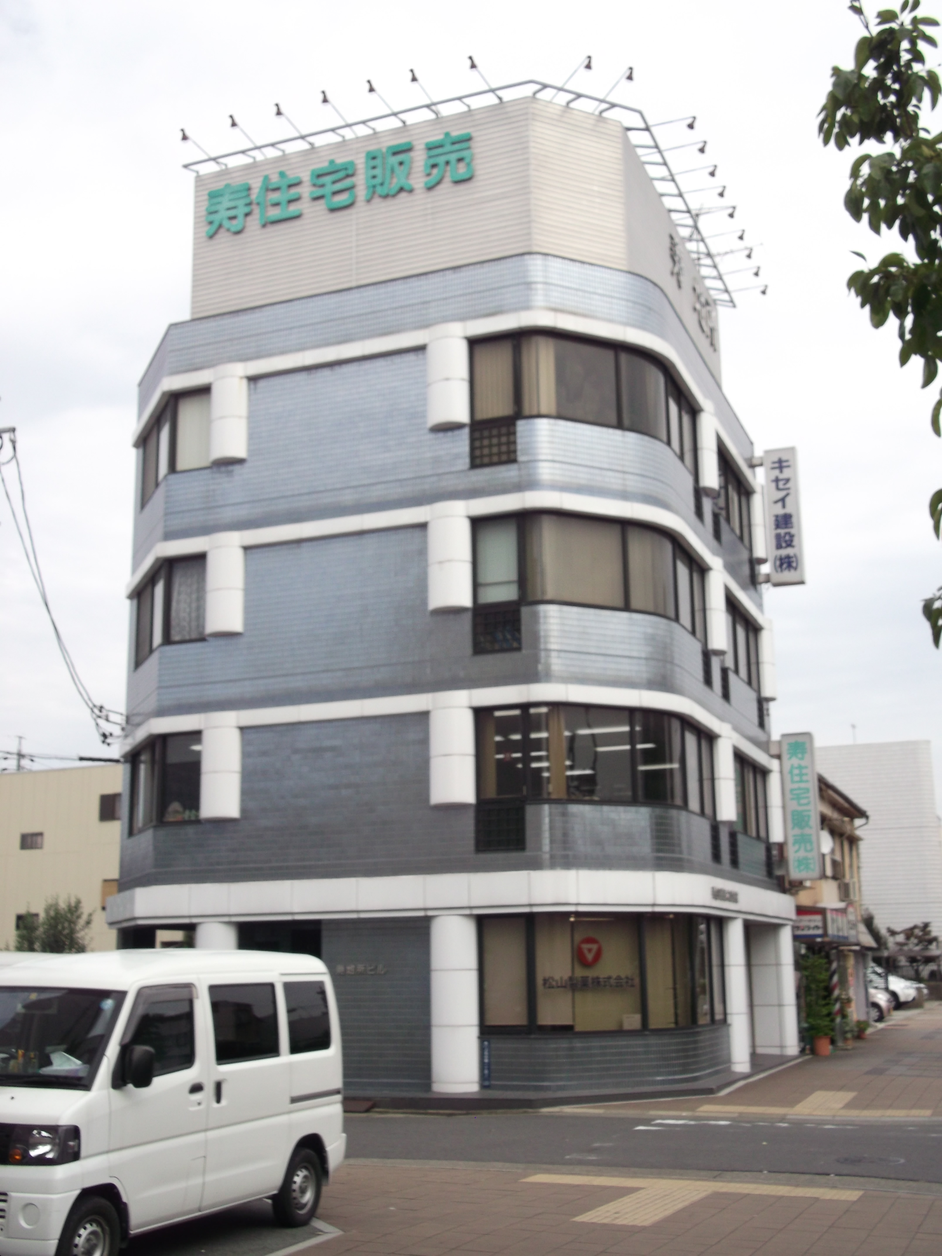 名古屋市西区上名古屋の松山製菓本社が入居する寿地所ビルを南側公道西側から撮影